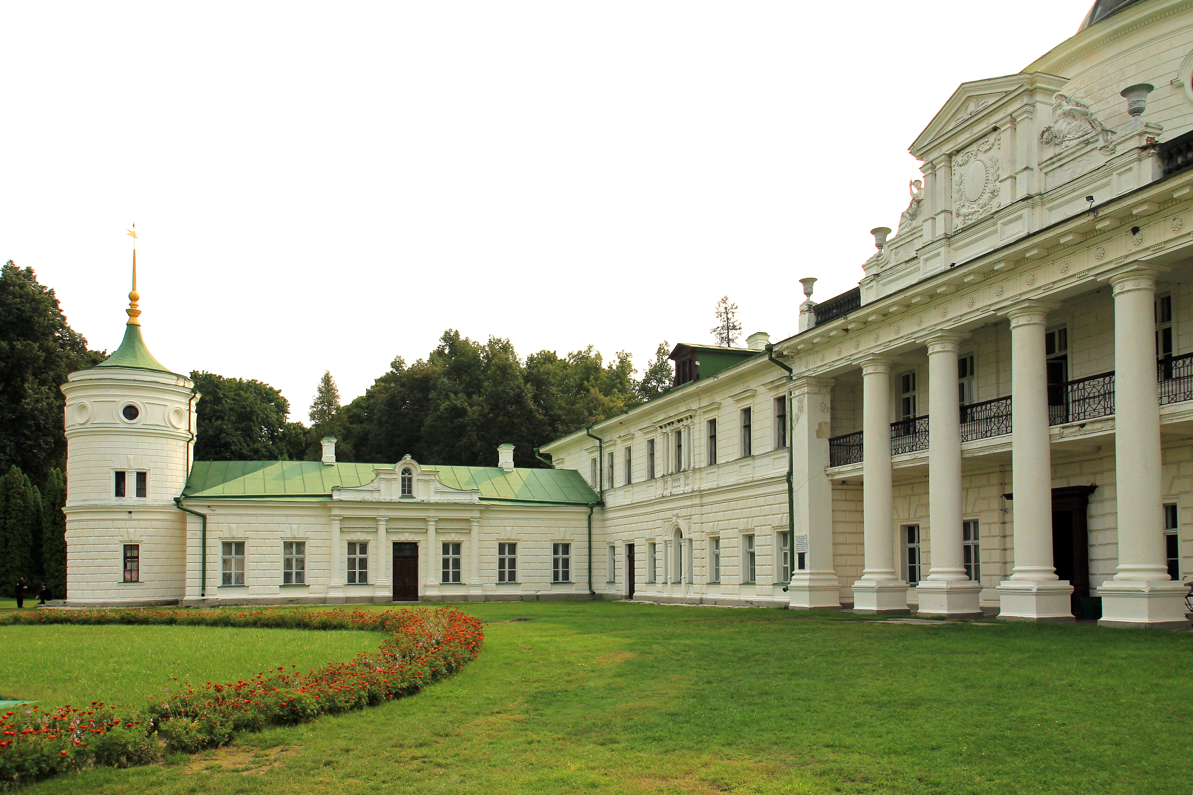 Комплекс споруд садиби "Качанiвка"